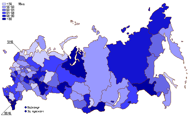 Явка на парламентских выборах 2007 года (по регионам)